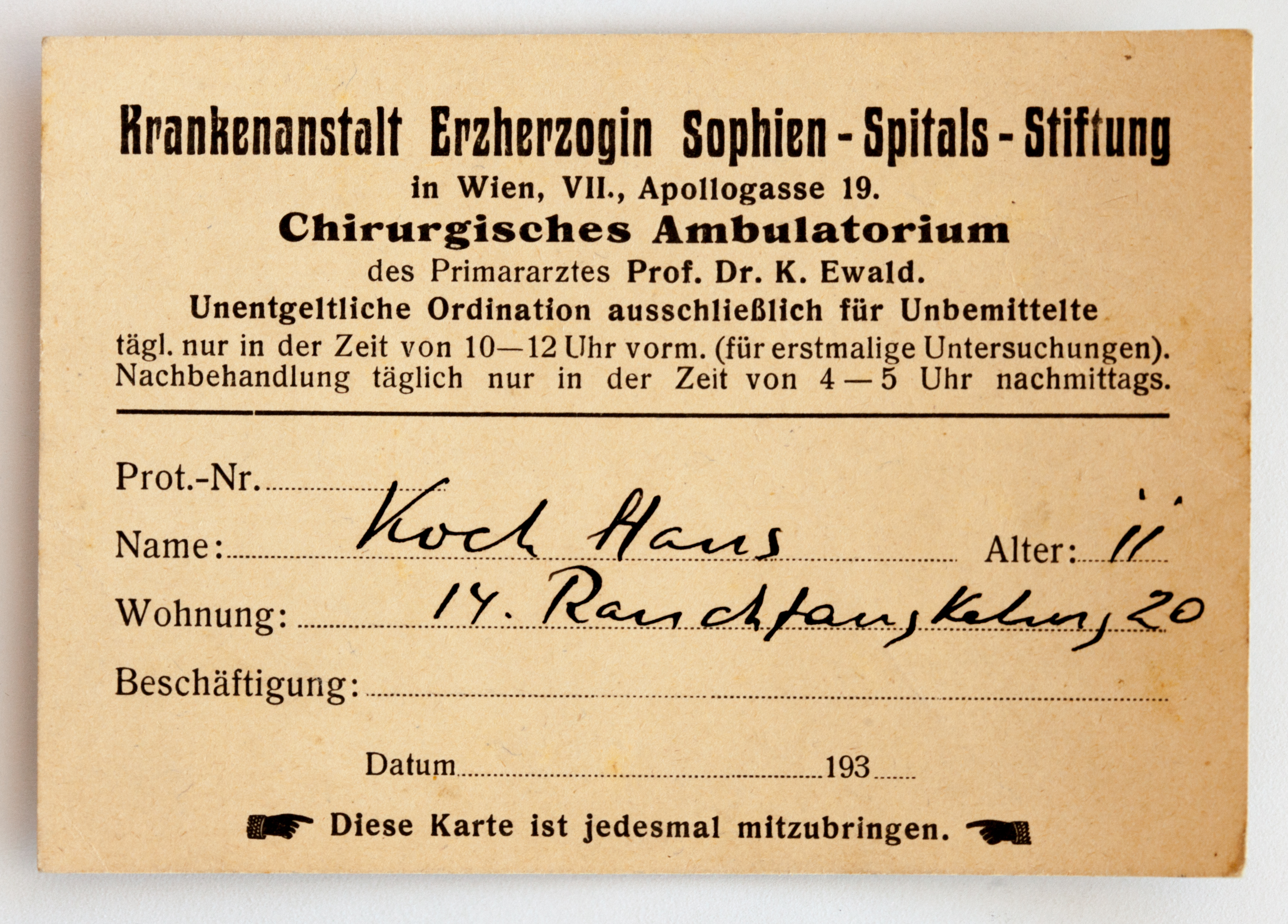 Feldpostbriefe von Hans Koch, Wien, 2. Weltkrieg, Ostfront, 1922-1945 vorheriger Brief (1933-02-22) Brief Datum (1933-02-22) nächster Brief (1934-08-31) Karte Vorderseite Rückseite TEXT Krankenanstalt Erzherzogin Sophien-Spitals-Stifung in Wien, VII., Apollogasse 19. Chirurgisches Ambulatorium des Primararztes Prof. Dr. K. Ewald. Unentgeltliche Ordination ausschließlich für Unbemittelte tägl. nur in der Zeit von 10-12 Uhr vorm. (für erstmalige Untersuchungen). Nachbehandlung täglich nur in der zeit von 4-5 Uhr nachmittags. ------ Prot.-Nr. Name: Koch, Hans; Alter: 11 Wohnung 14. Rauchfangkehrerg. 20 Beschäftigung: Datum: ............ 193..... Diese Karte ist jedesmal mitzubringen.